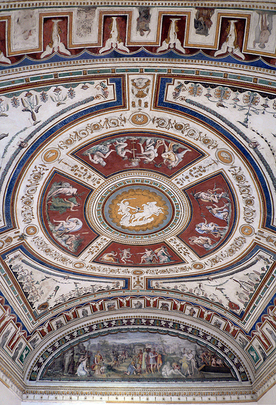 Venezia. Palazzo Grimani a Santa Maria Formosa. Stanza di Apollo.